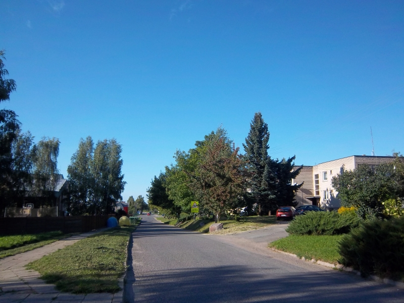 Sodų gatvė Gudienoje